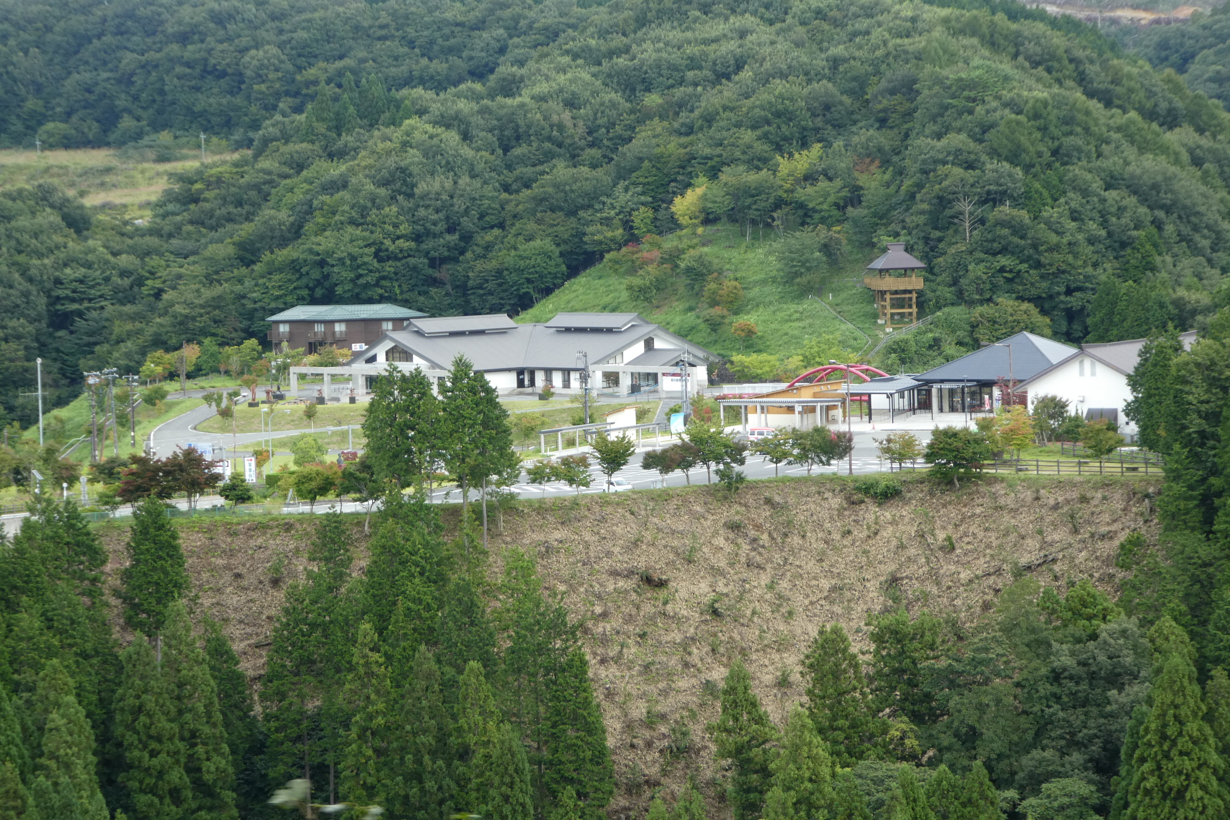 JR木次線車窓から見た道の駅奥出雲おろちループ